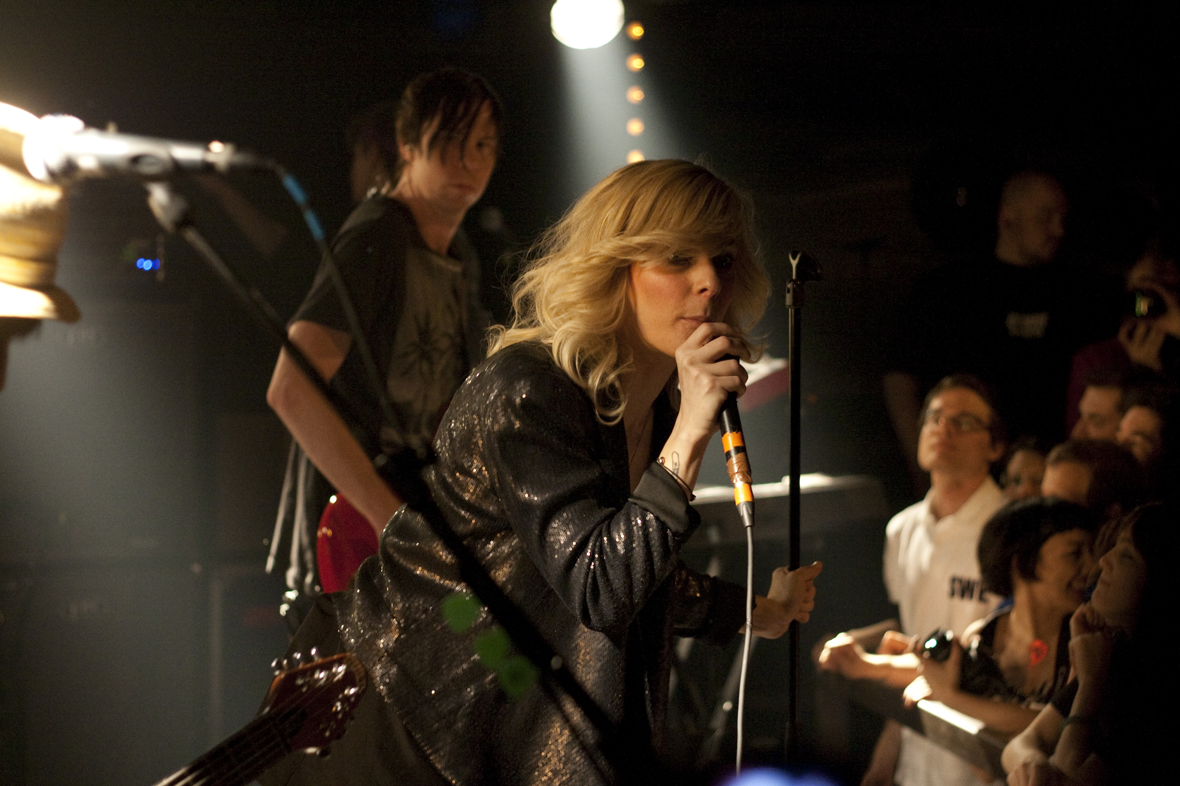 The Sounds, 2009 (Abart CH)